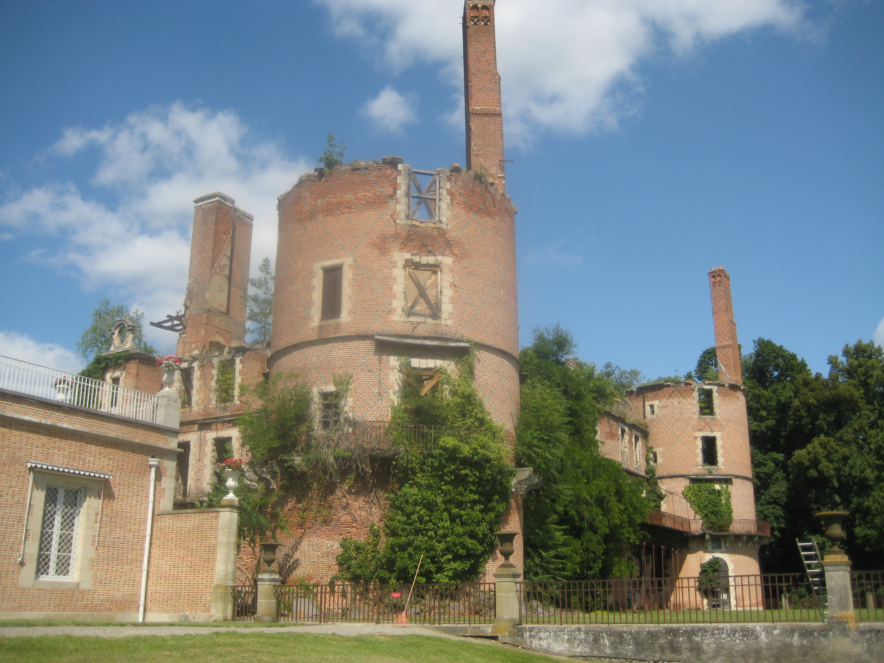 l'arrière du Château de Randan